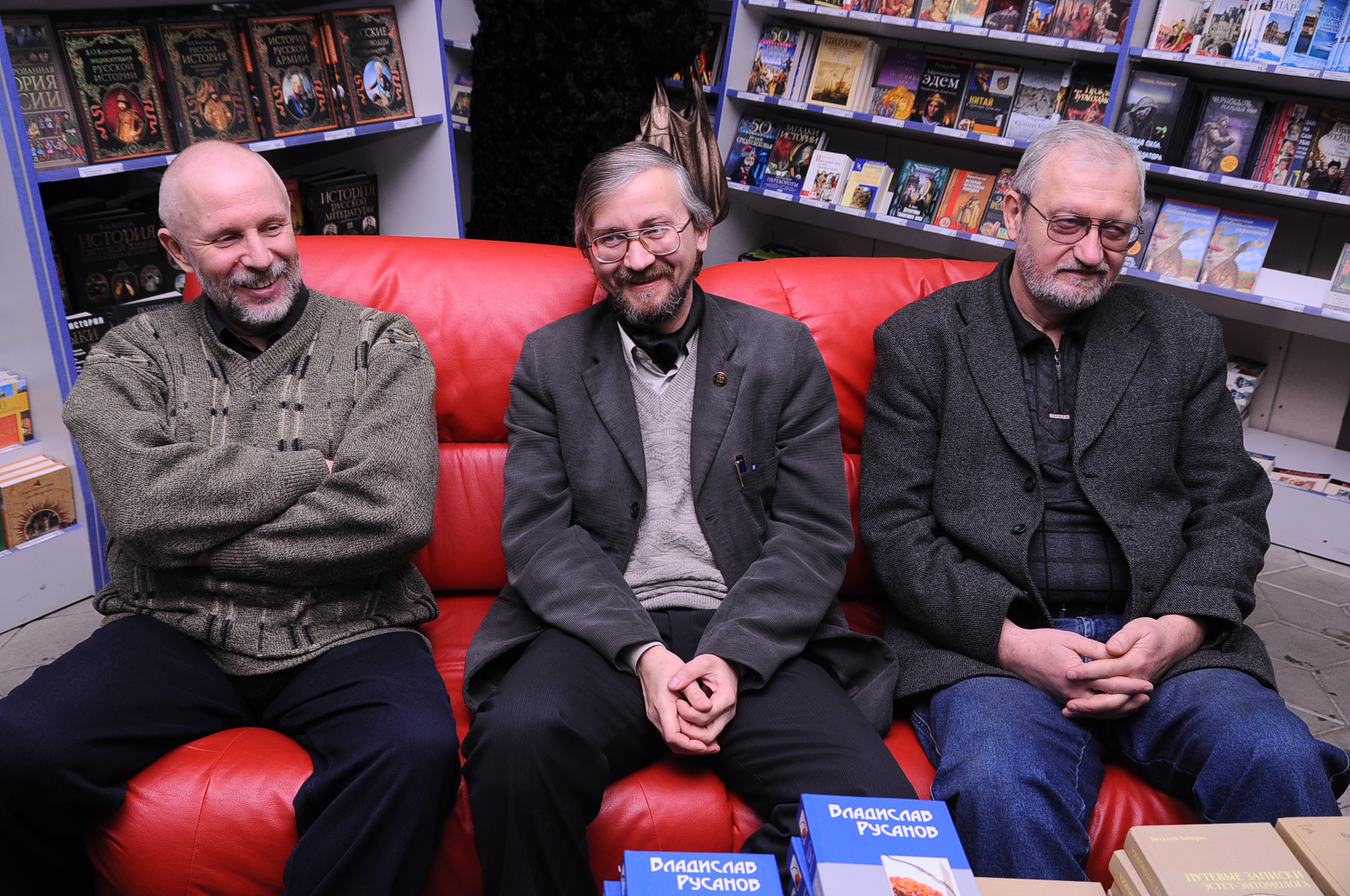 Донецк. Встреча с донецкими писателями-фантастами и афтограф-сессия.